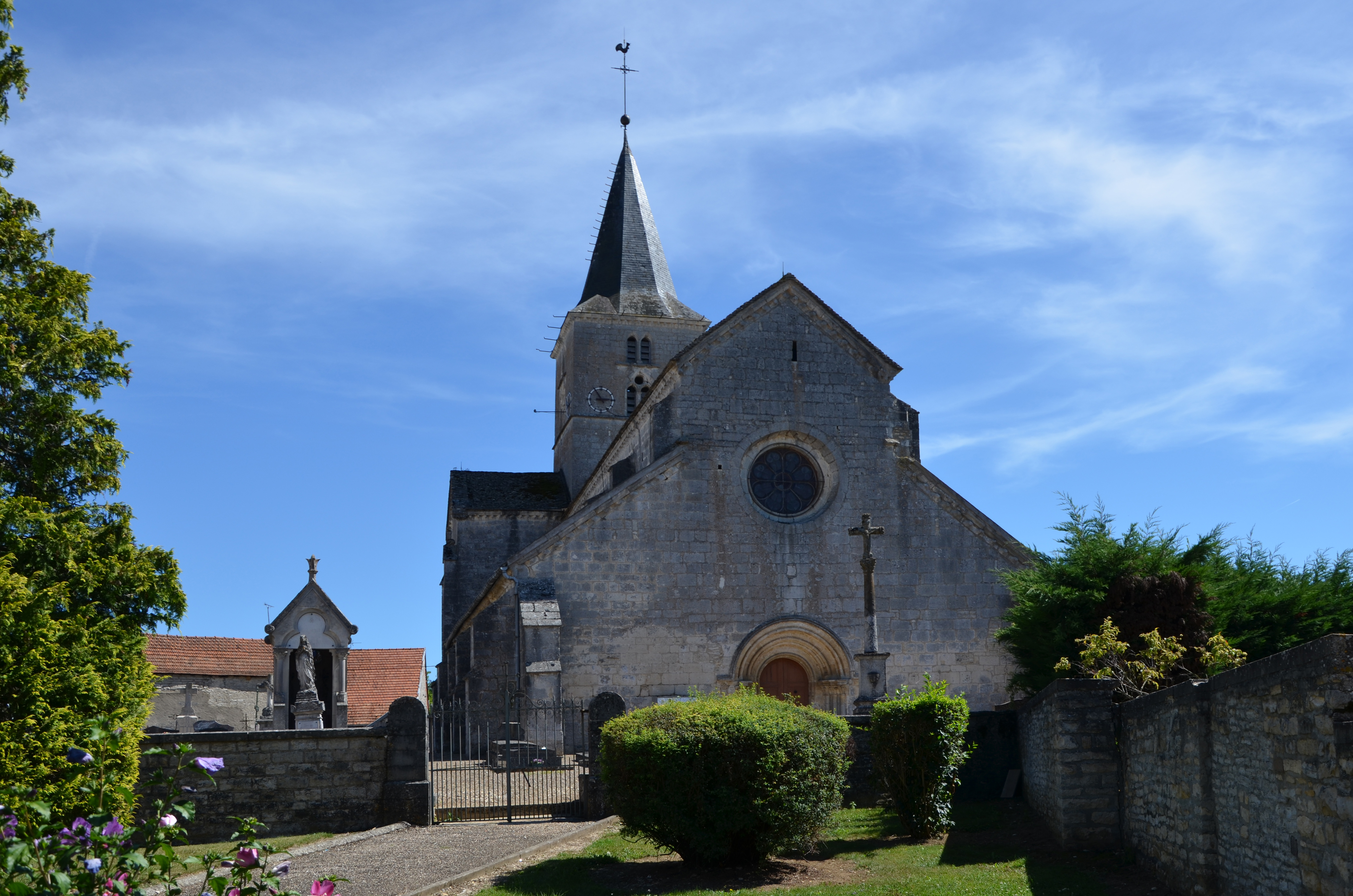 Église de St-Maurice-sur-Vingeanne, Côte d'Or, Bourgogne, France